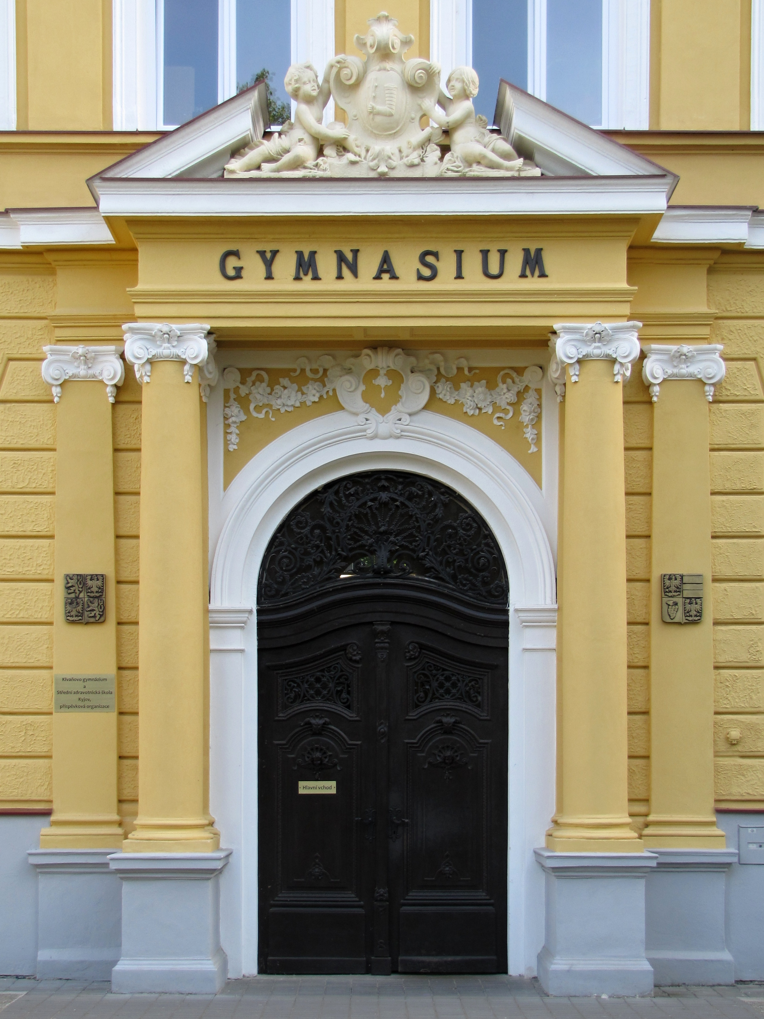 Hlavní vstup do Klvaňova gymnázia v Kyjově